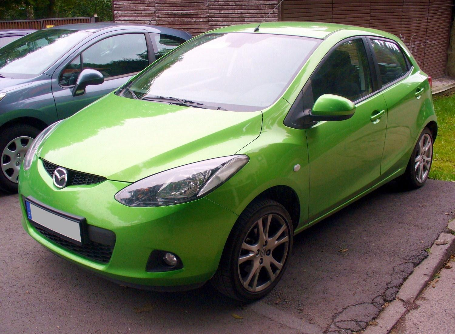 Mazda 2